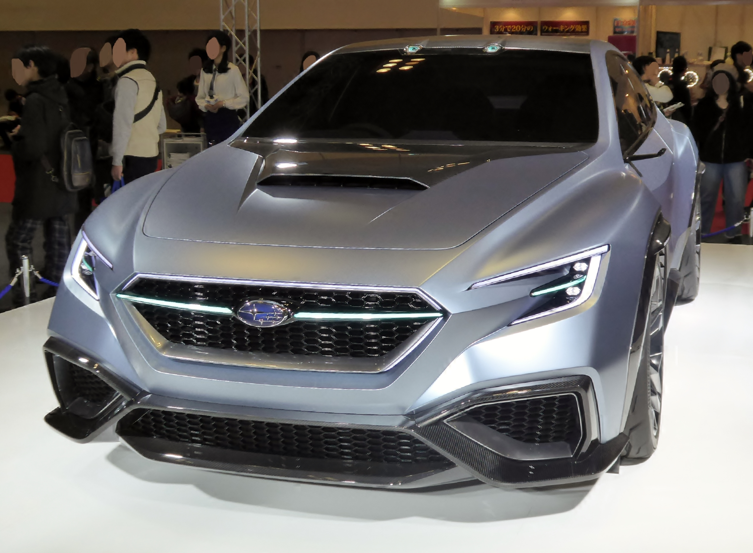 大阪モーターショー2017に於いてスバル・VIZIV PERFORMANCE CONCEPTを撮影。